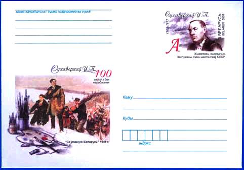 Конверт №84 с оригинальной маркой Республики Беларусь от 3 декабря 2008 г. Суховерхов В. П. 1908-1977. 100 лет со дня рождения. "За родную Беларусь" 1948 г. (на бел. яз.). Репродукция картины. Художник конверта - Анна Романовская.